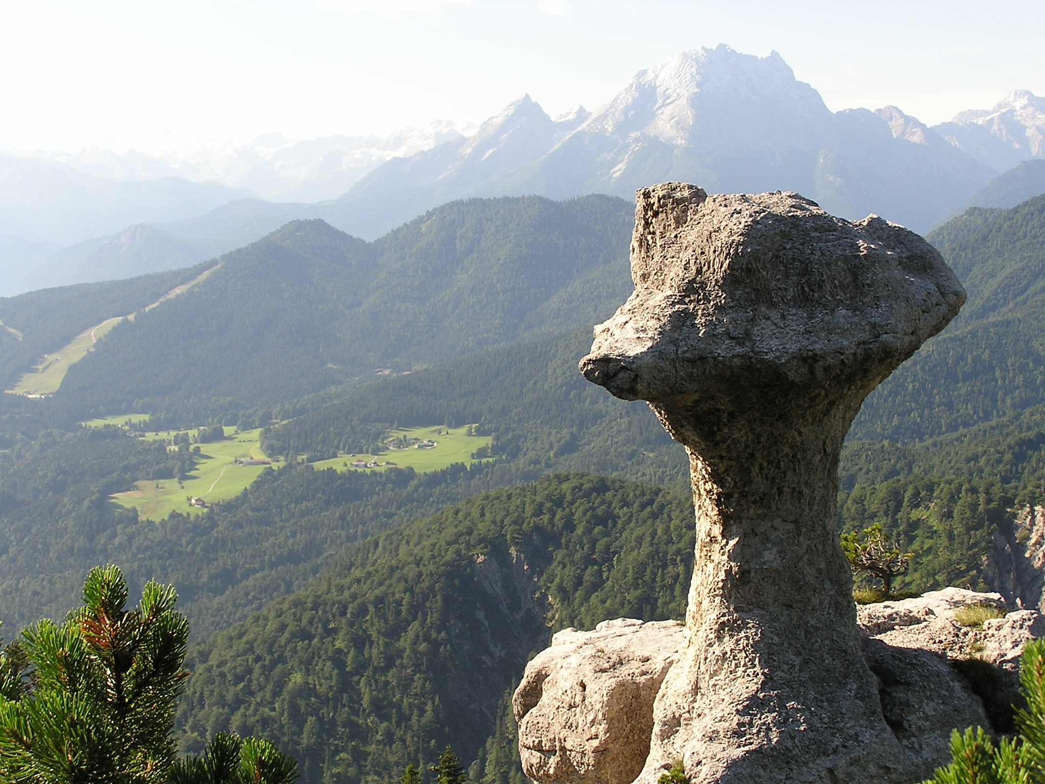 Blick vom Geotop "Steinerne Agnes" im Lattengebirge, auf das Loipler Hochplateau, mit dem Schigebiet Götschen, dem Mühllehen und im Hintergrund dem Berchtesgadener Wahrzeichen, dem Watzmann (2713m). Das Foto wurde am 09.08.05 von Gamsjaga selbst aufgenommen.